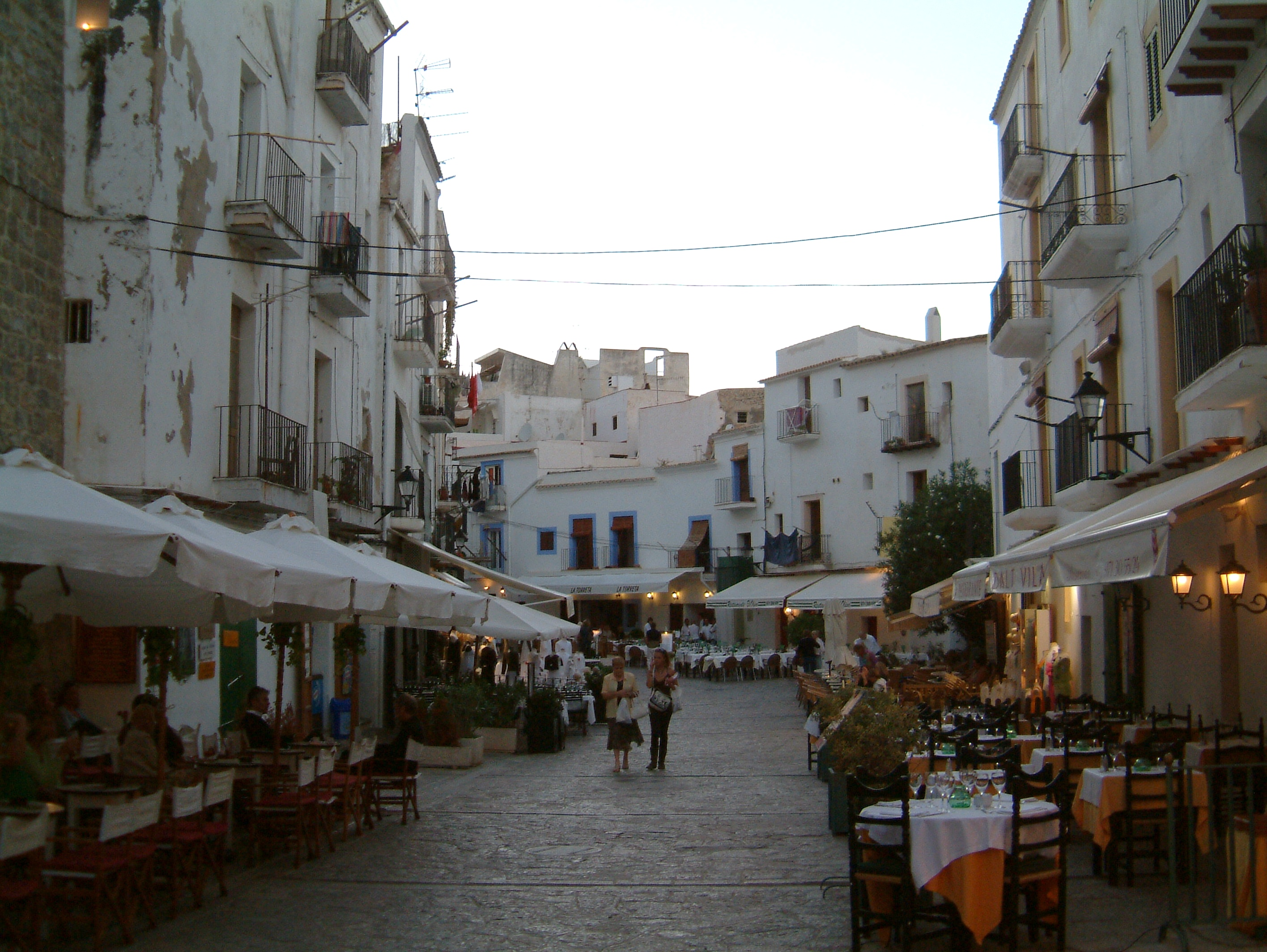 Das Hafenviertel von Ibiza-Stadt am Abend.